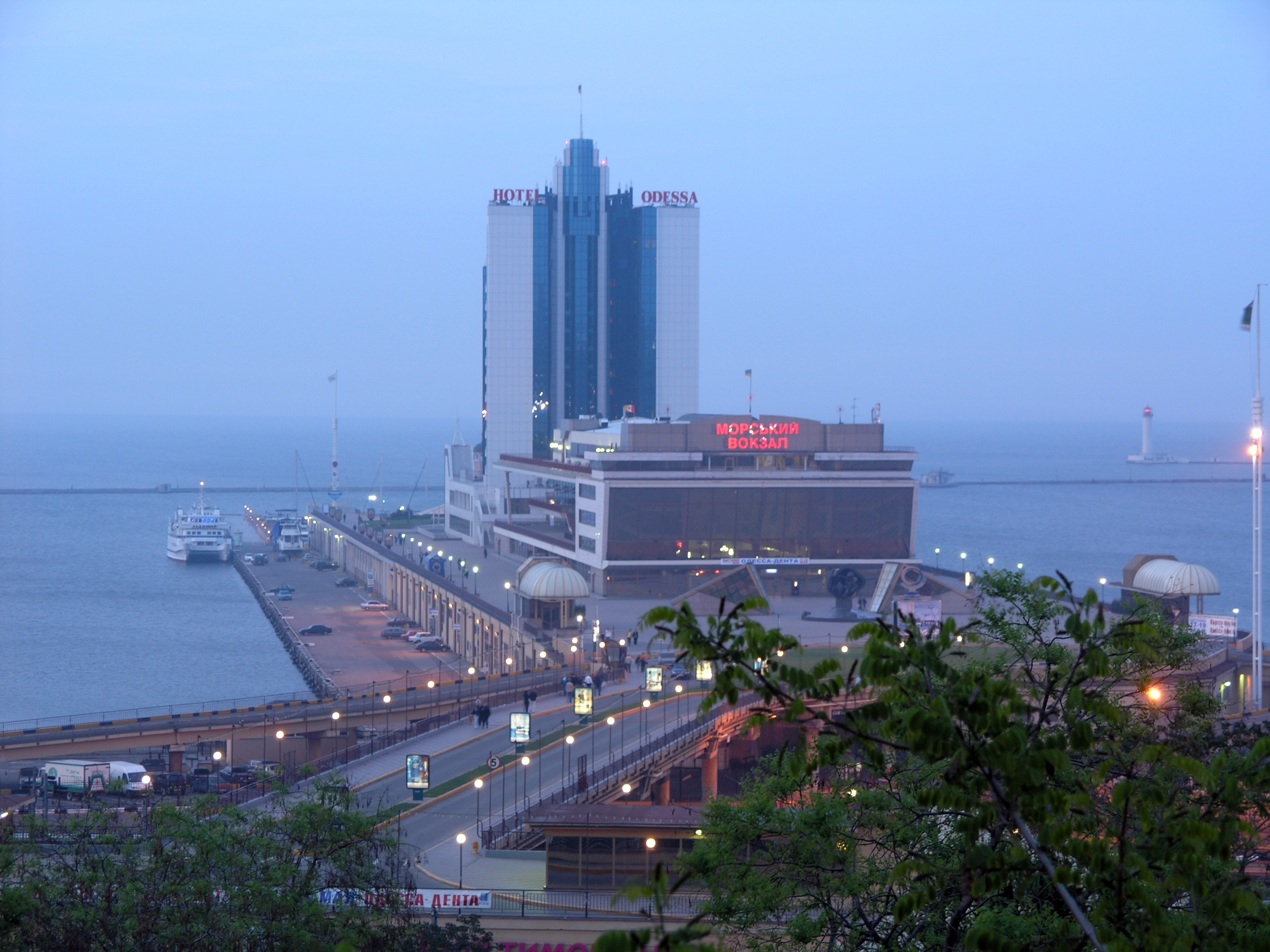 Україна, Одеса - територія Морського вокзалу, де відбулося закладання перших споруд, які поклали початок будівництву порту і міста Одеси та відбулося повстання французьких військових моряків